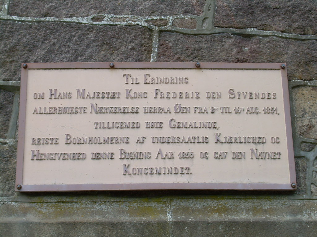 Mindepladen på Kongemindet, Rytteknægten, Bornholm